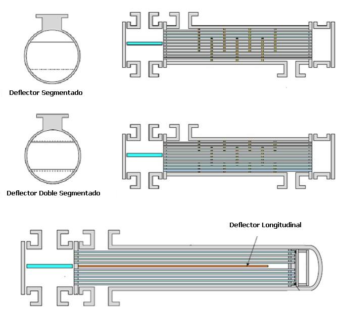 Esquema general de los tipos de deflectores en Intercambiadores de Calor de Carcasa y Tubos.